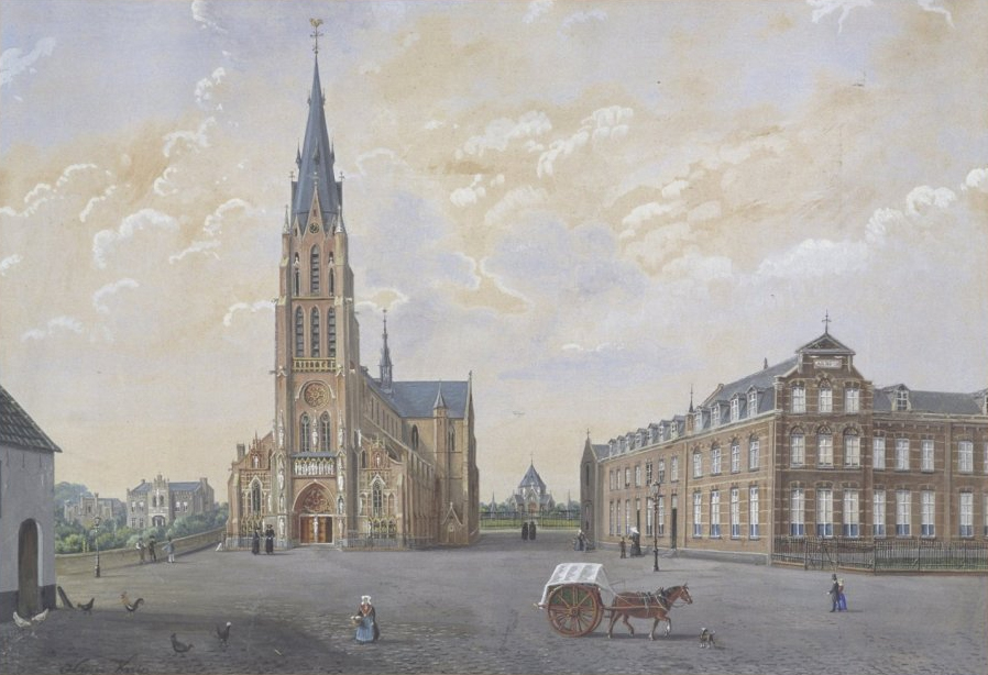 Sint Lambertuskerk: Interieur, detail schilderij, uit de pastorie van de kerk (opmerking: Gefotografeerd voor de publicatie van het boek Pierre Cuypers, architect van 1827 tot 1921)